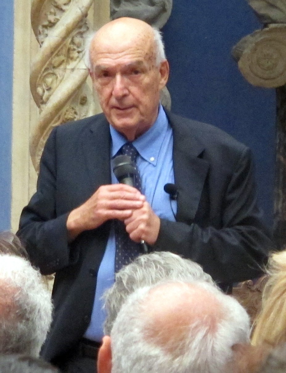 Firenze